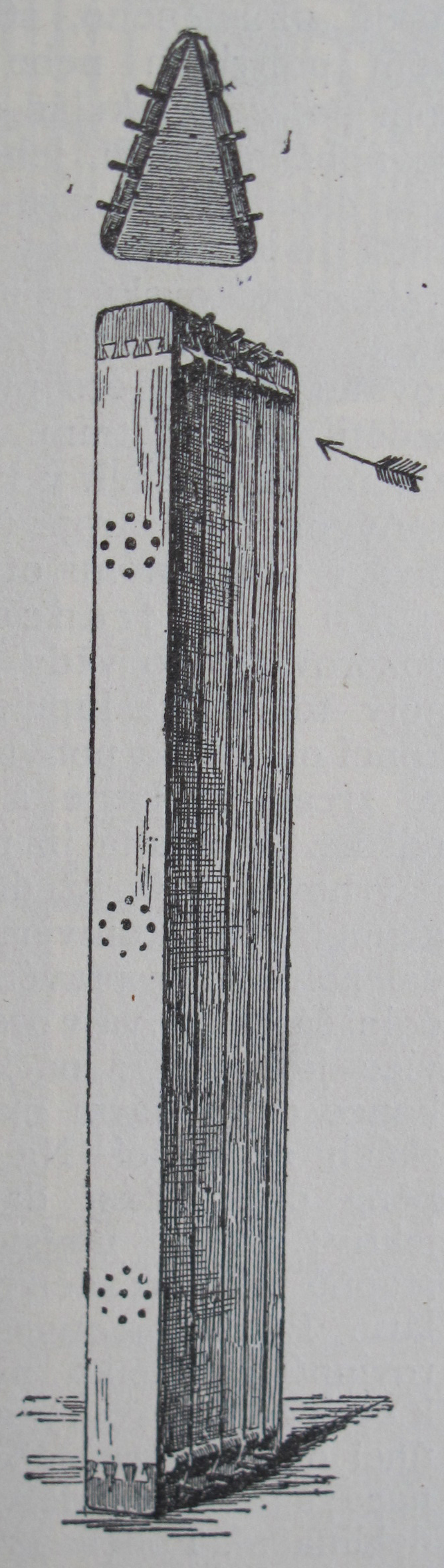 Původní popisek: Č. 71. Aeolova harfa.